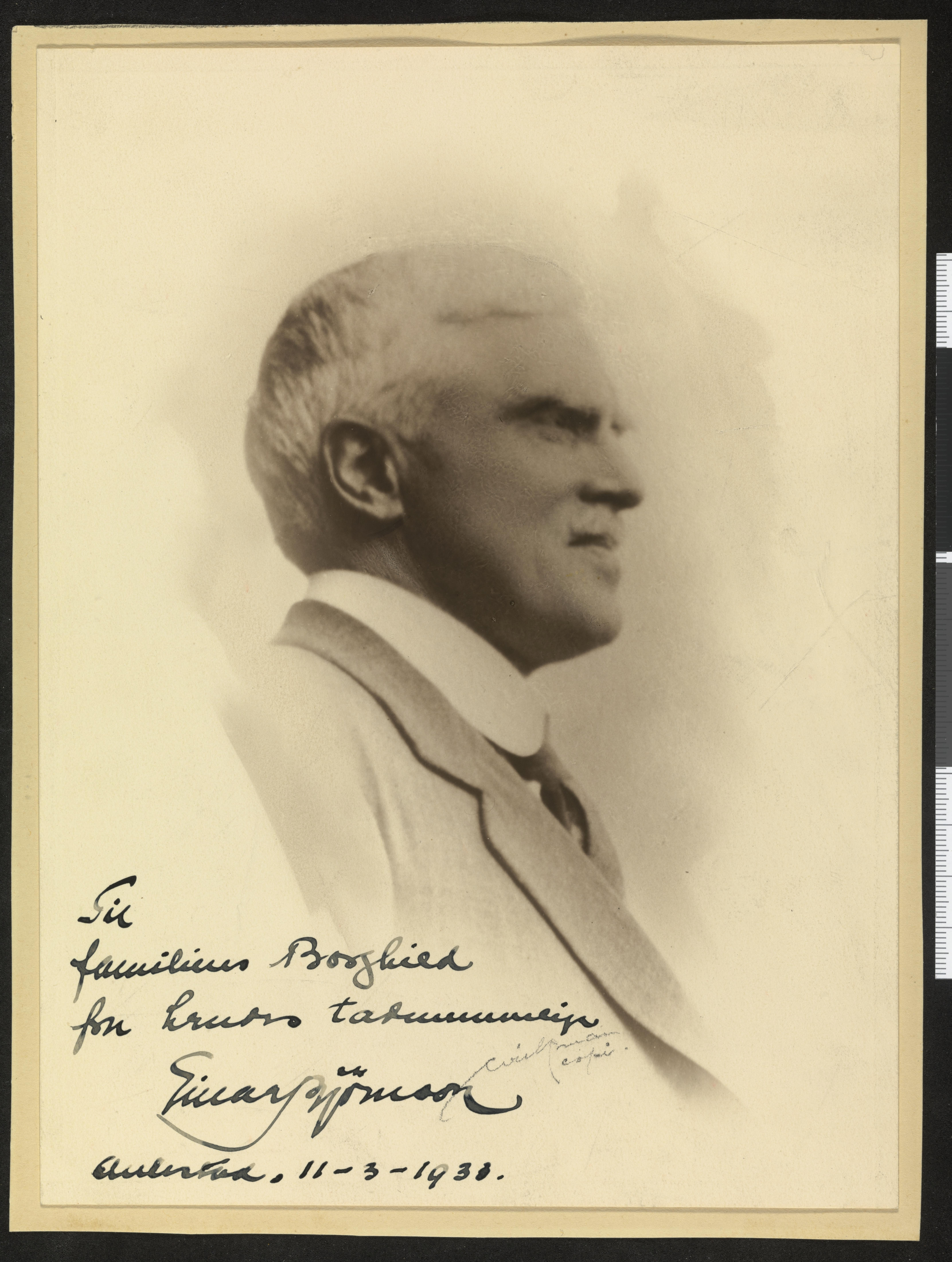 Bildet er hentet fra Nasjonalbibliotekets bildesamling Depicted person: Bjørnson, Einar